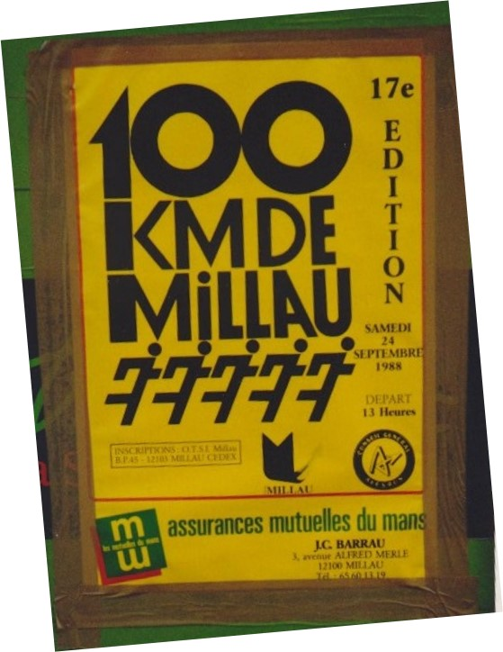 Plakat (Vorankündigung) zum 100-km-Straßenlauf in Millau am 24. September 1988